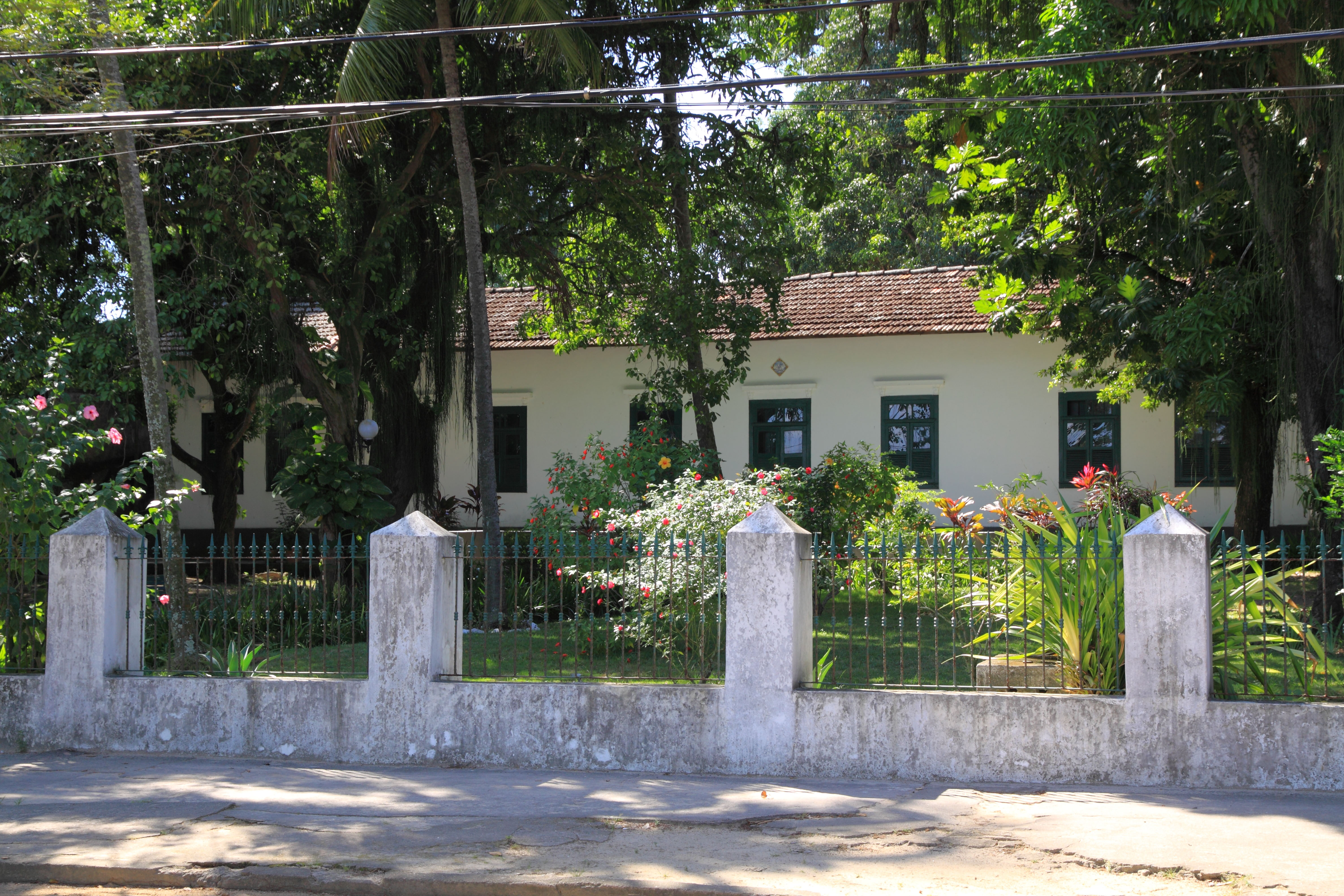 Casa de José Bonifácio de Andrada e Silva em Paquetá no período de 1831 a 1838.